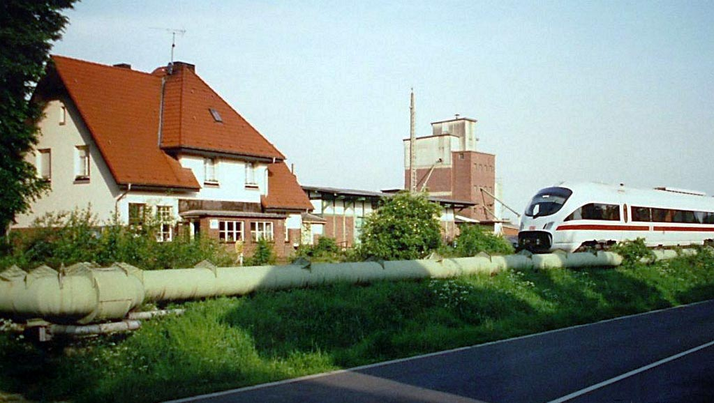 ICE im Bahnhof Ratheim (2000) Reworked version of Image:ICEimRF1.jpg by Wikipeder